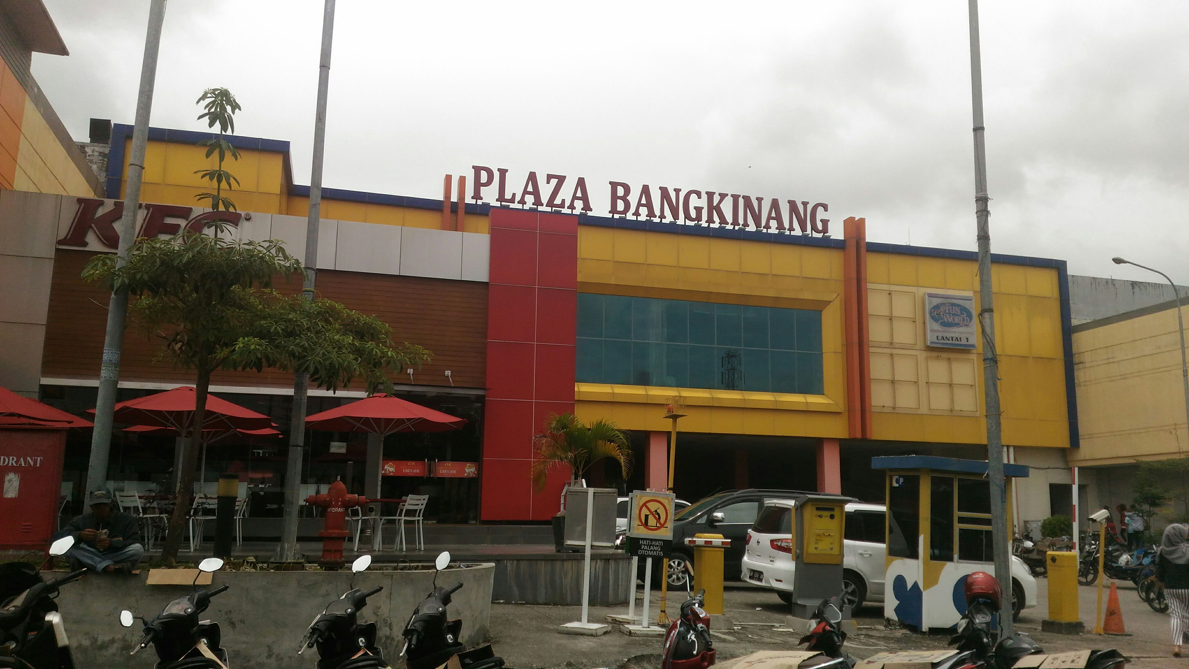 Kota Bangkinang, Kabupaten Kampar, Riau.